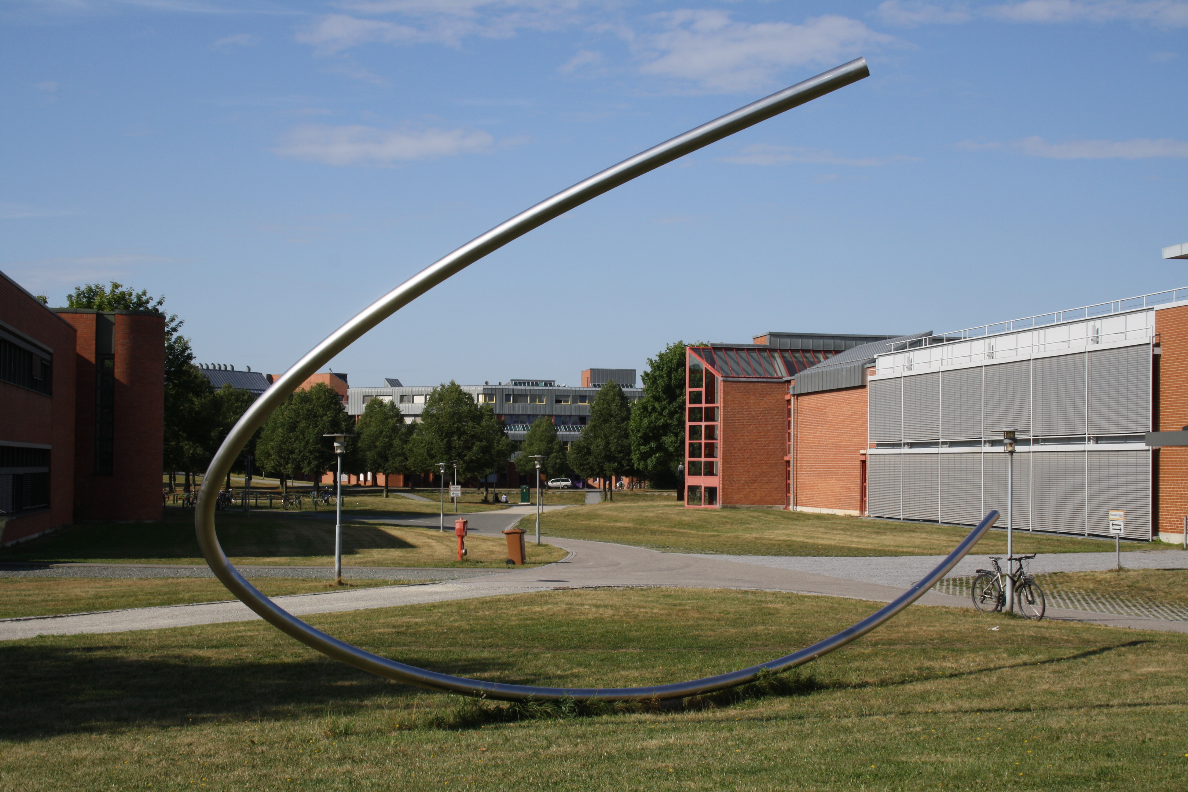 Bayreuth - Universitätscampus. Kunstwerk "Große Raumkurve" des Bildhauers Norbert Kricke.